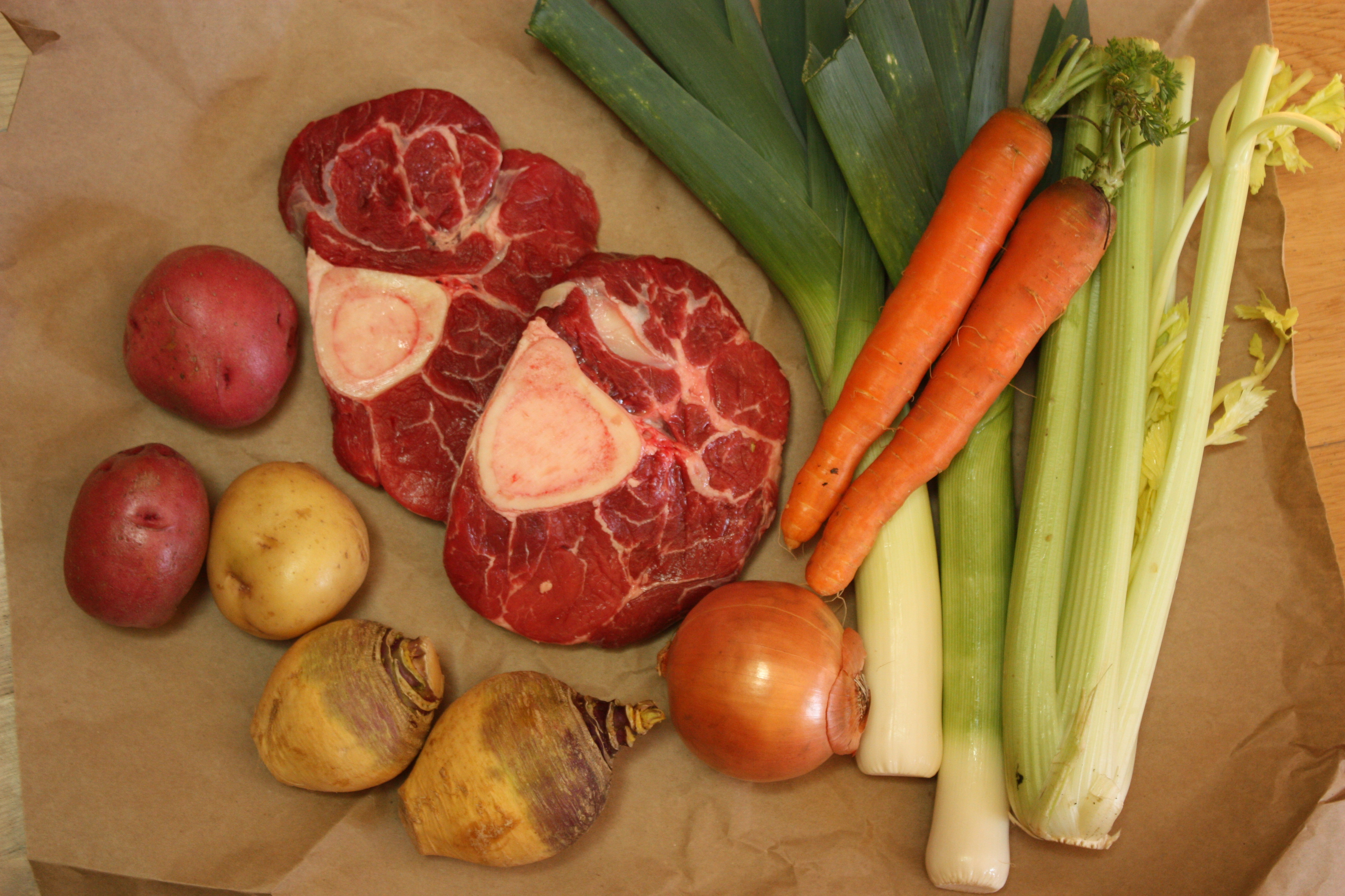 Pot-au-feu ingrédients